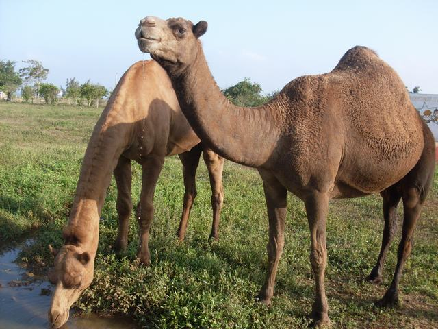 Dromedarios en Cayo Saetia, Holguin, Cuba.